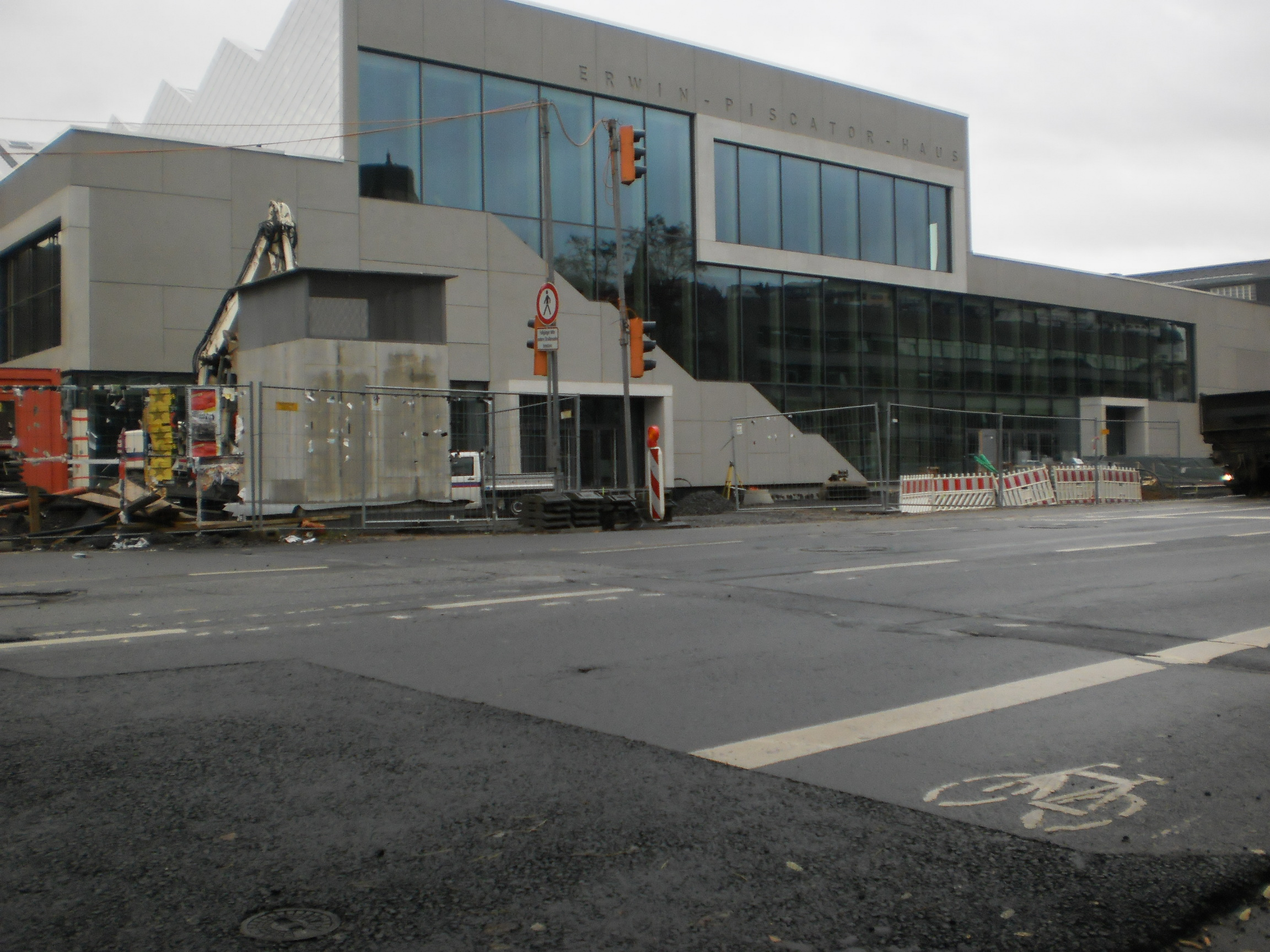 Das Erwin-Piscator-Haus (Stadthalle) an der Biegenstraße in Marburg zum Ende der Bauarbeiten im November 2015.